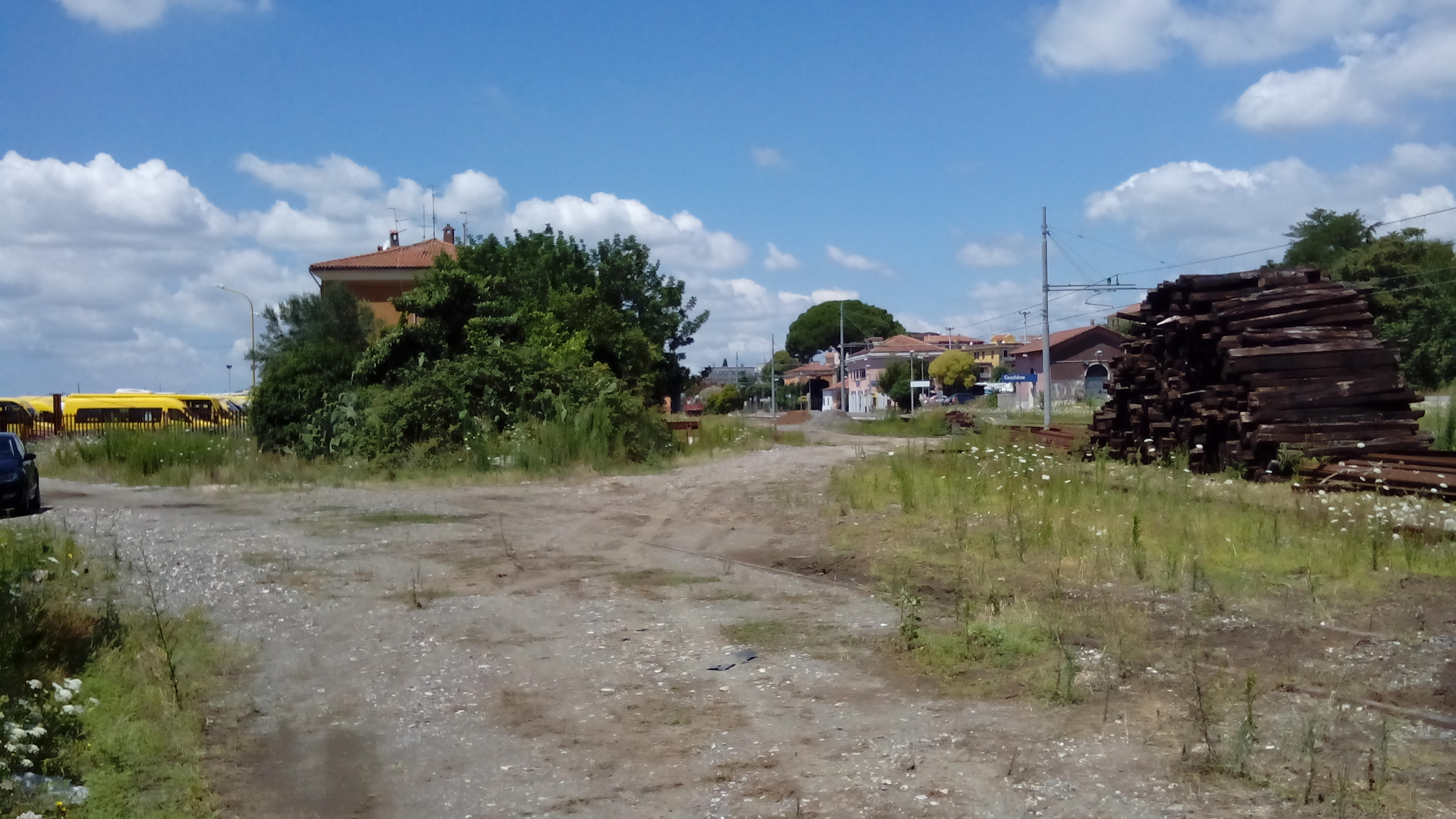 Veduta generale dell'impianto. A sinistra: la vecchia stazione con il vecchio fascio merci (è appena visibile solo il secondo binario di raccordo). A destra: la stazione "nuova" di Cecchina con i suoi relativi impianti.